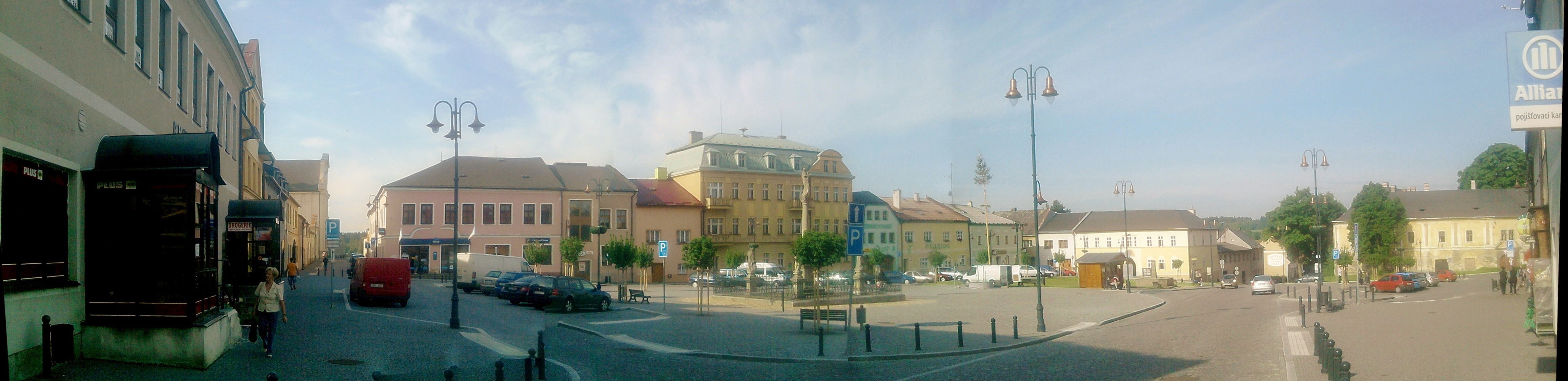 364 01 Toužim, Czech Republic